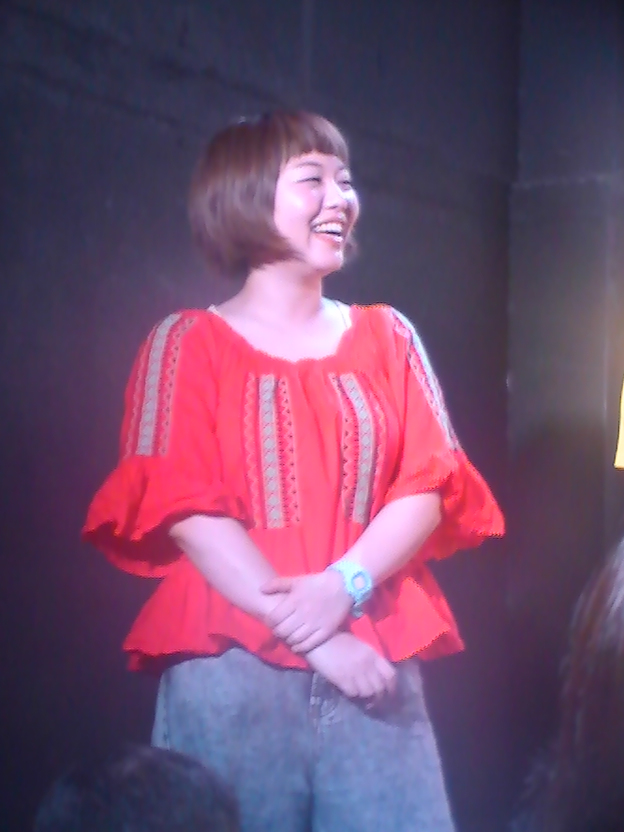 小出真保 (2017年7月14日)